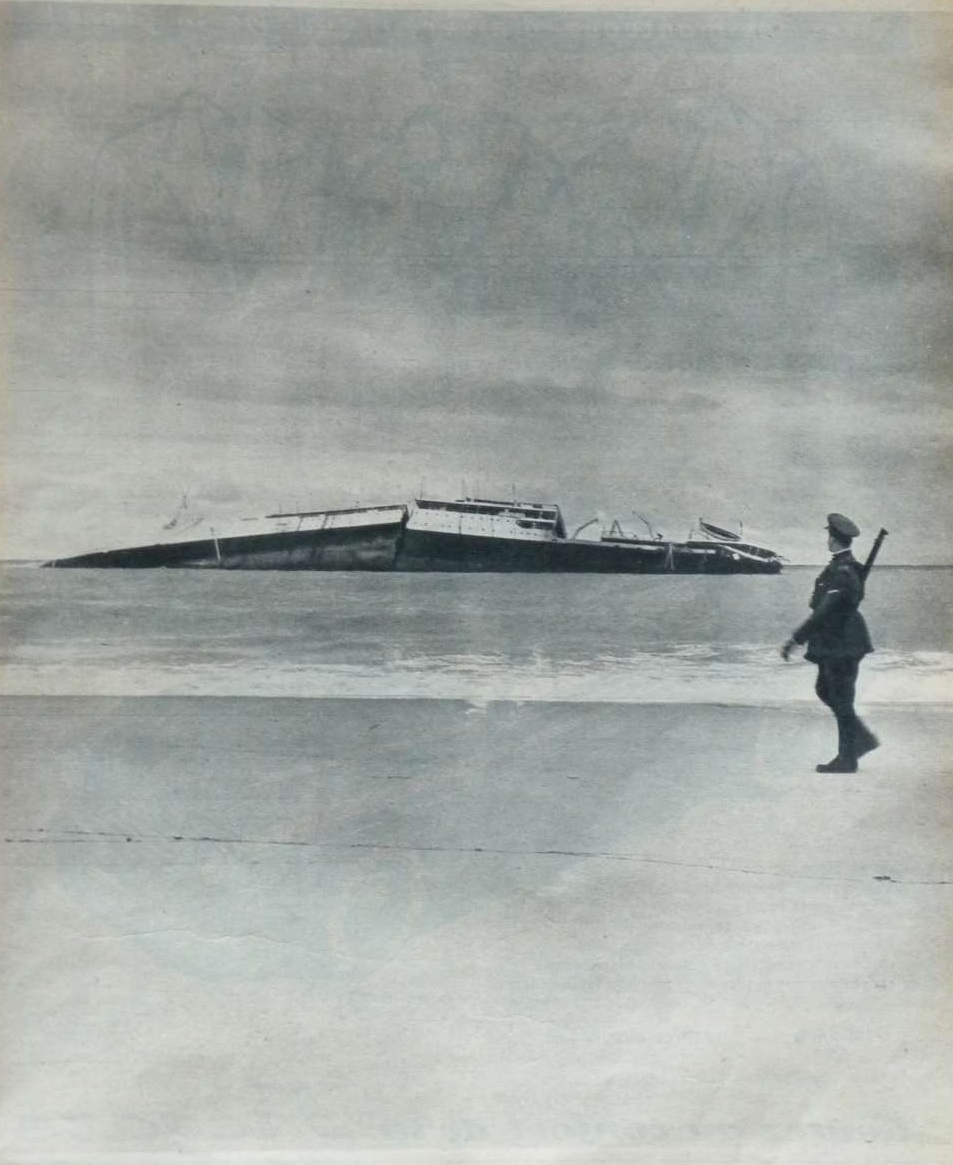 Champollion naufrage1